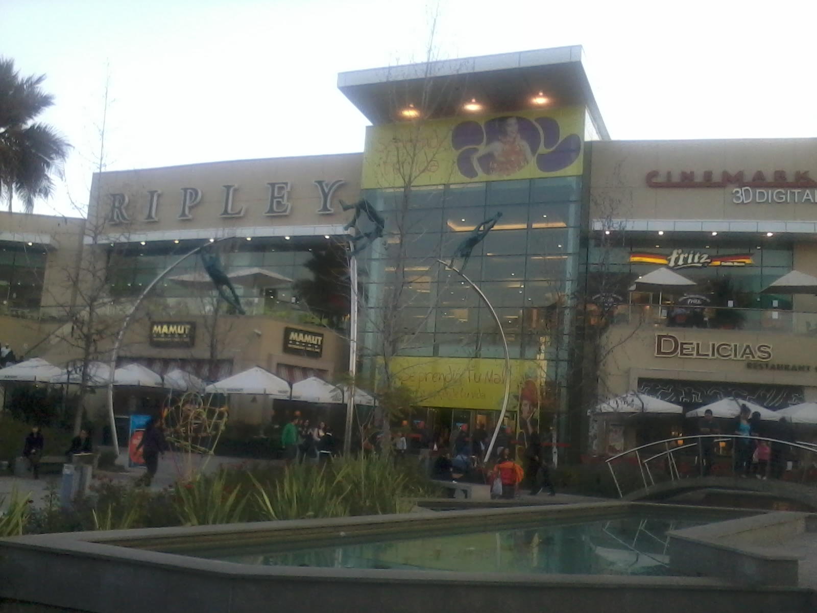 Mall Plaza Tobalaba , ubicado en el sector nororiente de la comuna de Puente Alto